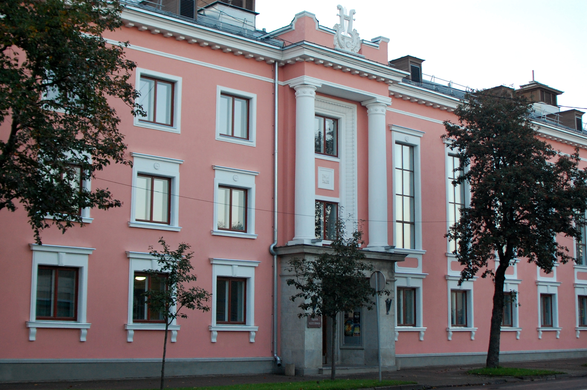 Viljandi kultuurimaja